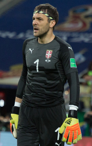 Сборная Бразилии оставляет Сербию за бортом ЧМ-2018 и выходит в плей-офф